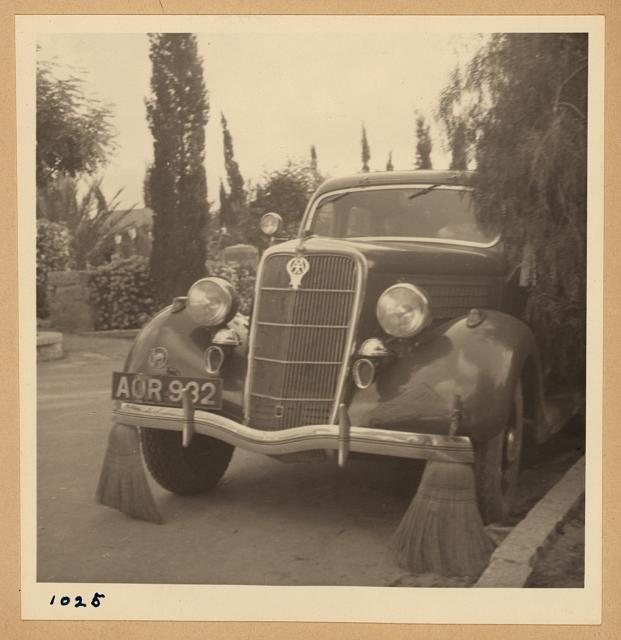 המרד הערבי הגדול 1936, רכב לפינוי מסמרים מהכביש